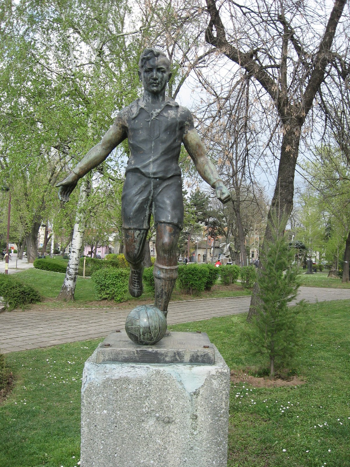 Споменик фудбалеру који се удавио у Нишави. Снимљено у априлу 2010.